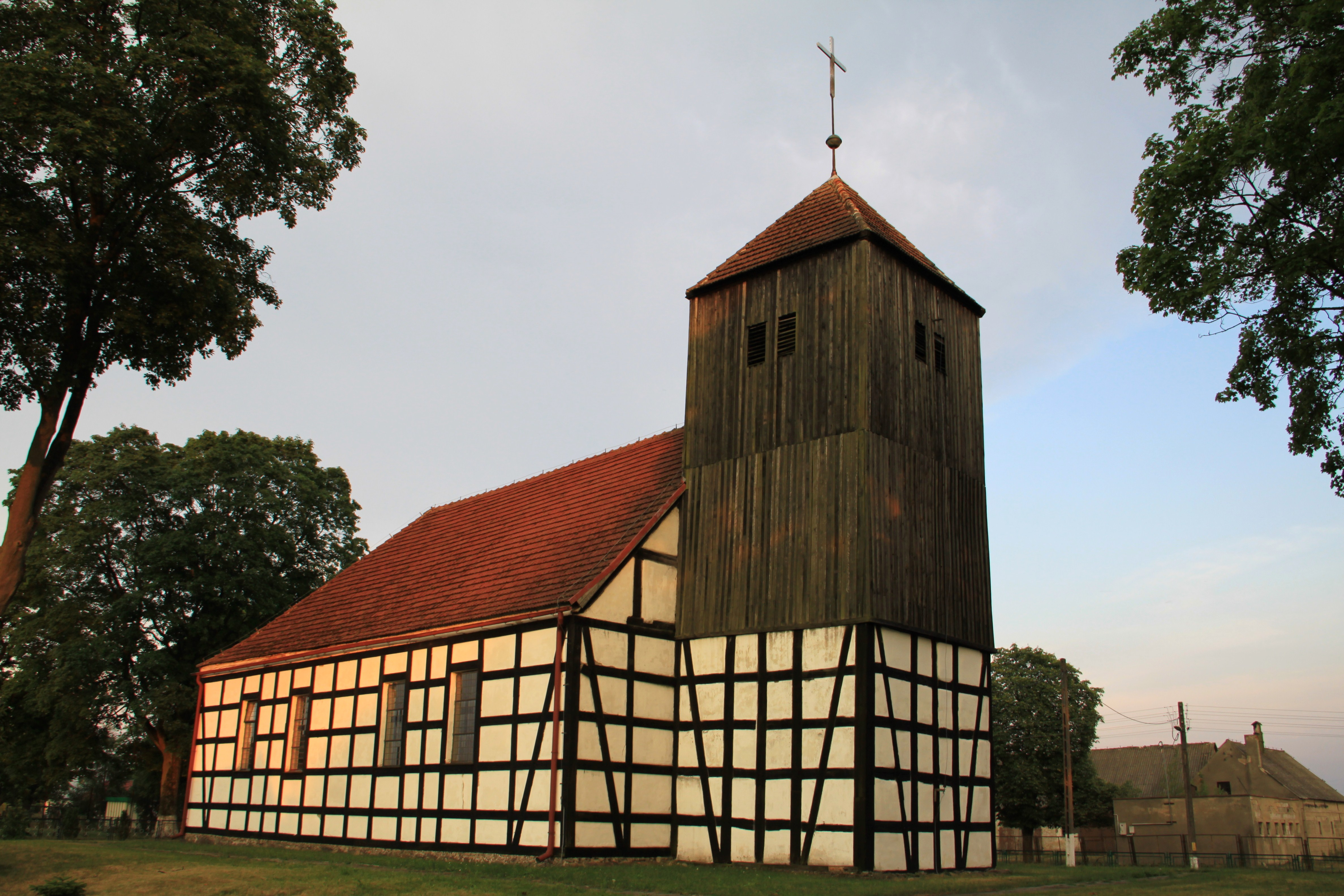 Brzeziny - dawny kościół ewangelicki, obecnie rzymskokatolicki parafialny p.w. Nawiedzenia NMP, 2 poł. XVIII